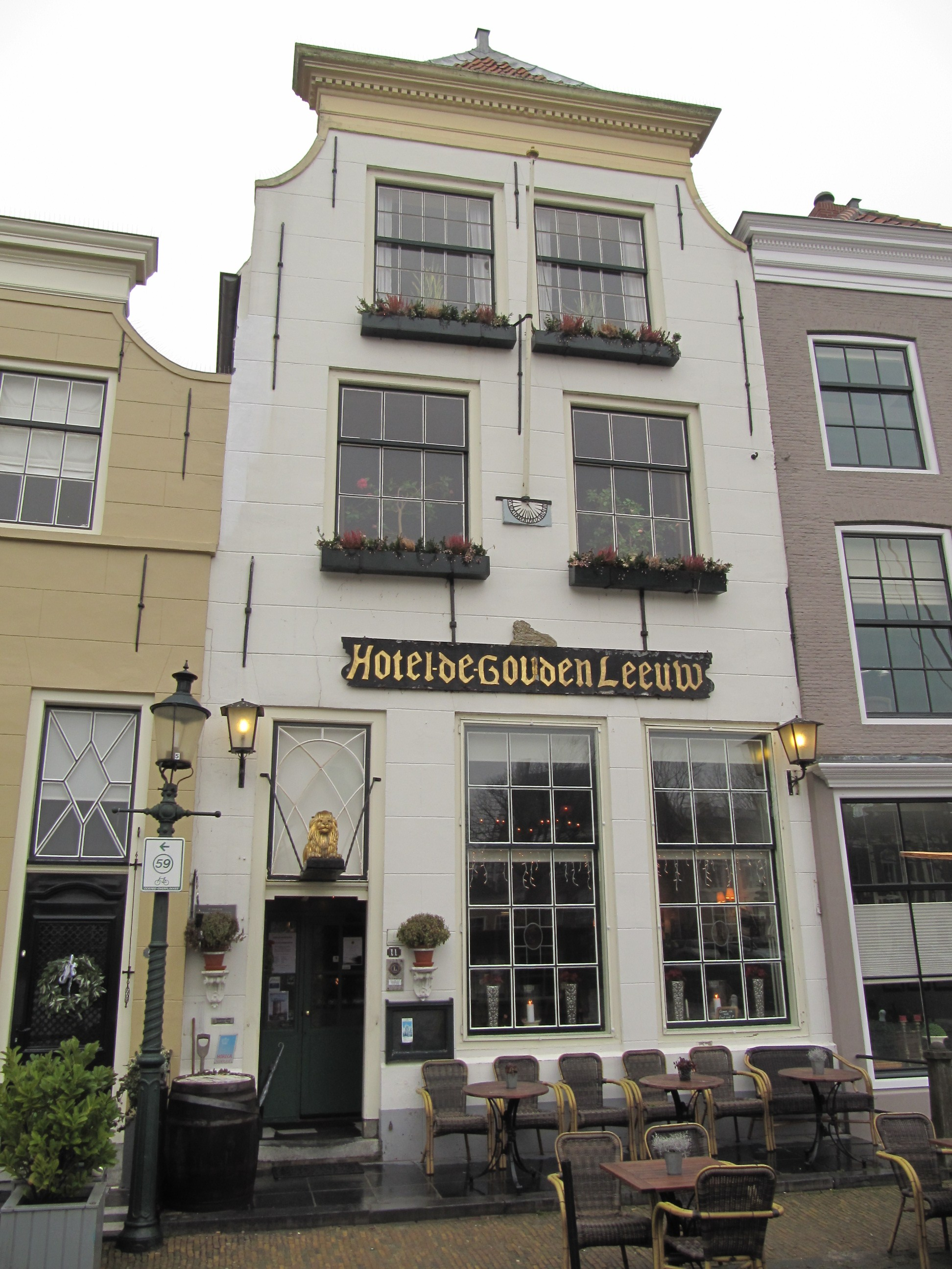 RM16180 Goedereede - Markt 11.jpg